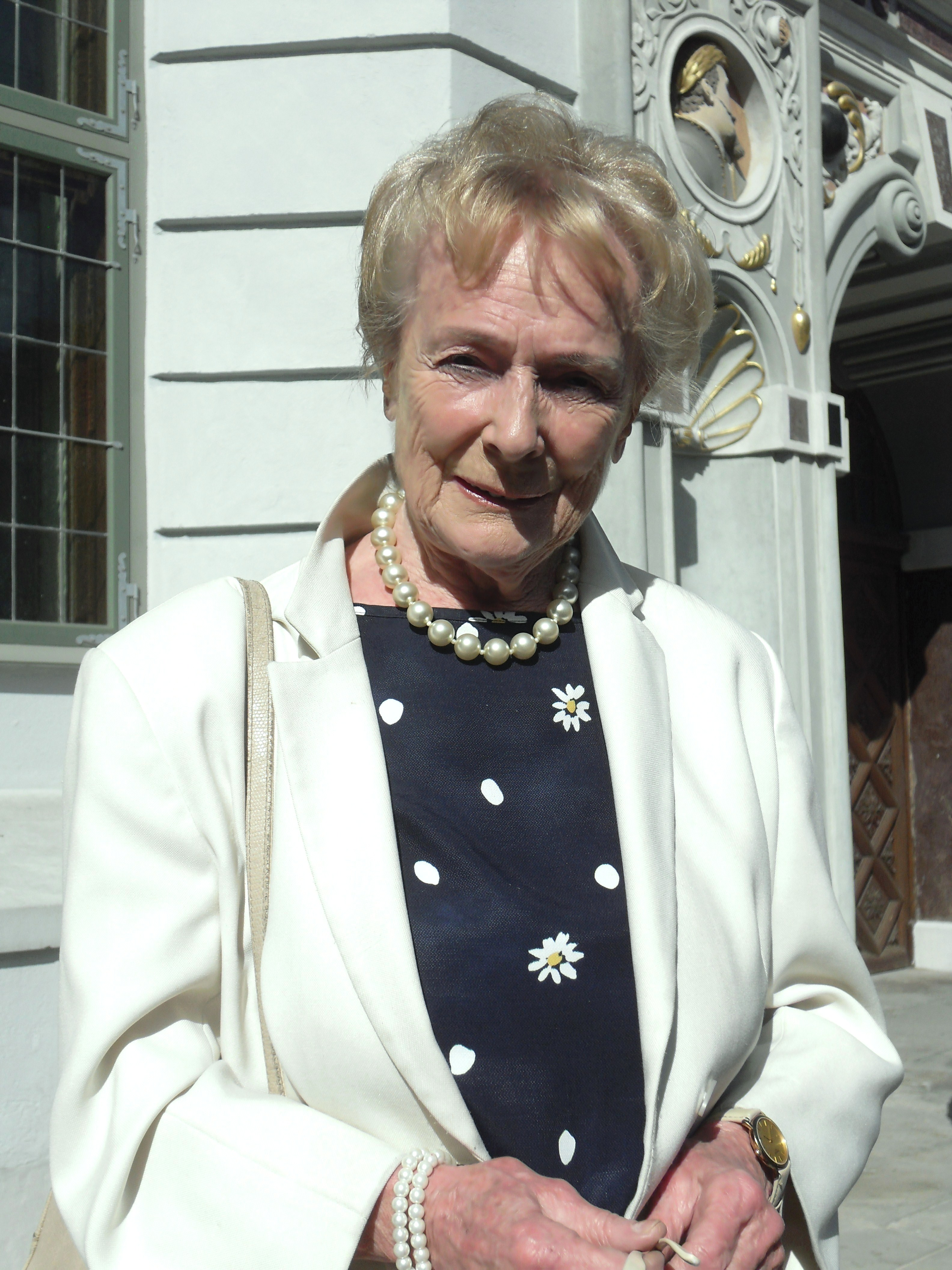 Olga Krzyżanowska, działaczka polityczna i społeczna, lekarka, posłanka na Sejm, senator.